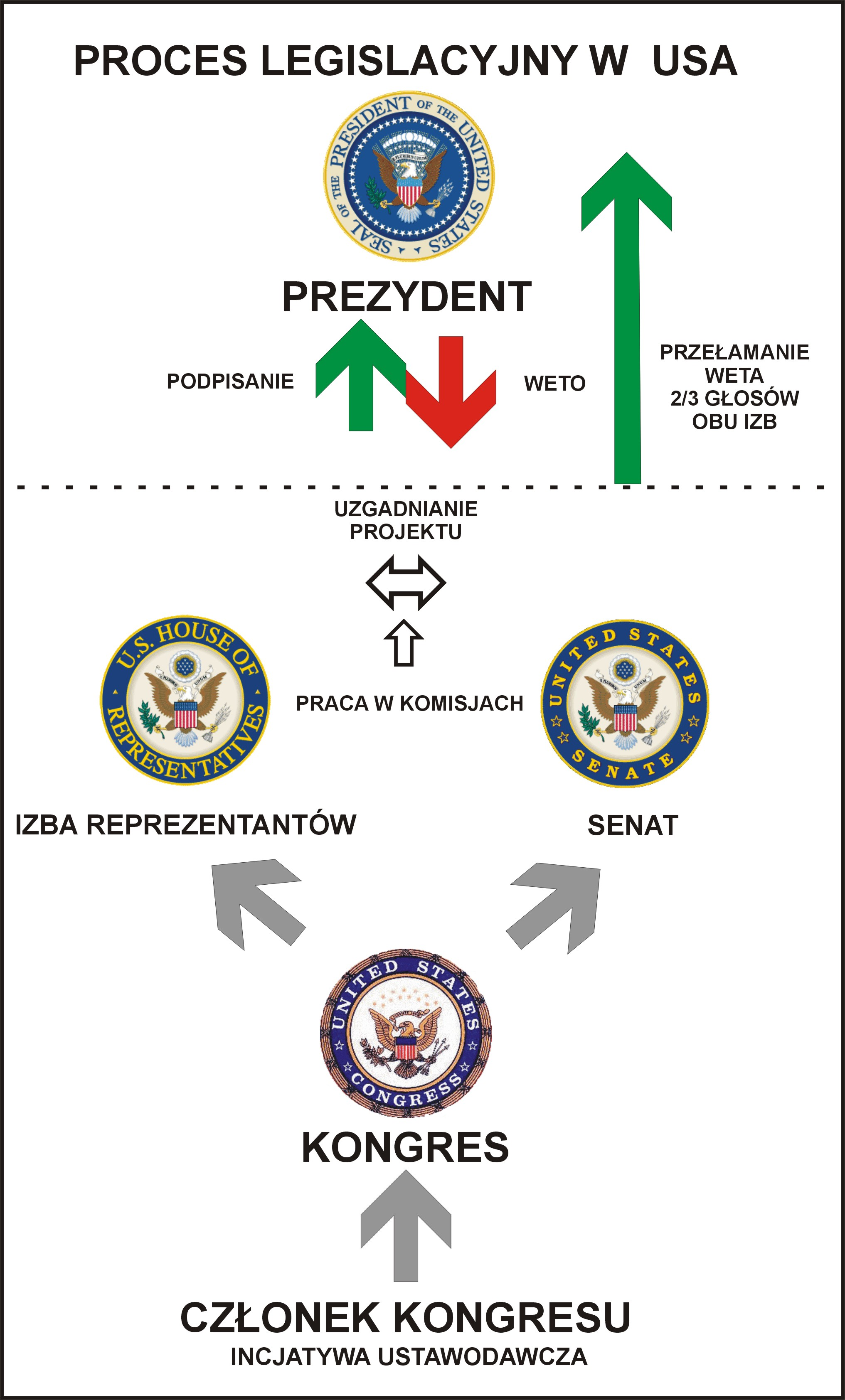 Schemat procesu legislacyjnego w Stanach Zjednoczonych. United States legislation process scheme in Polish.